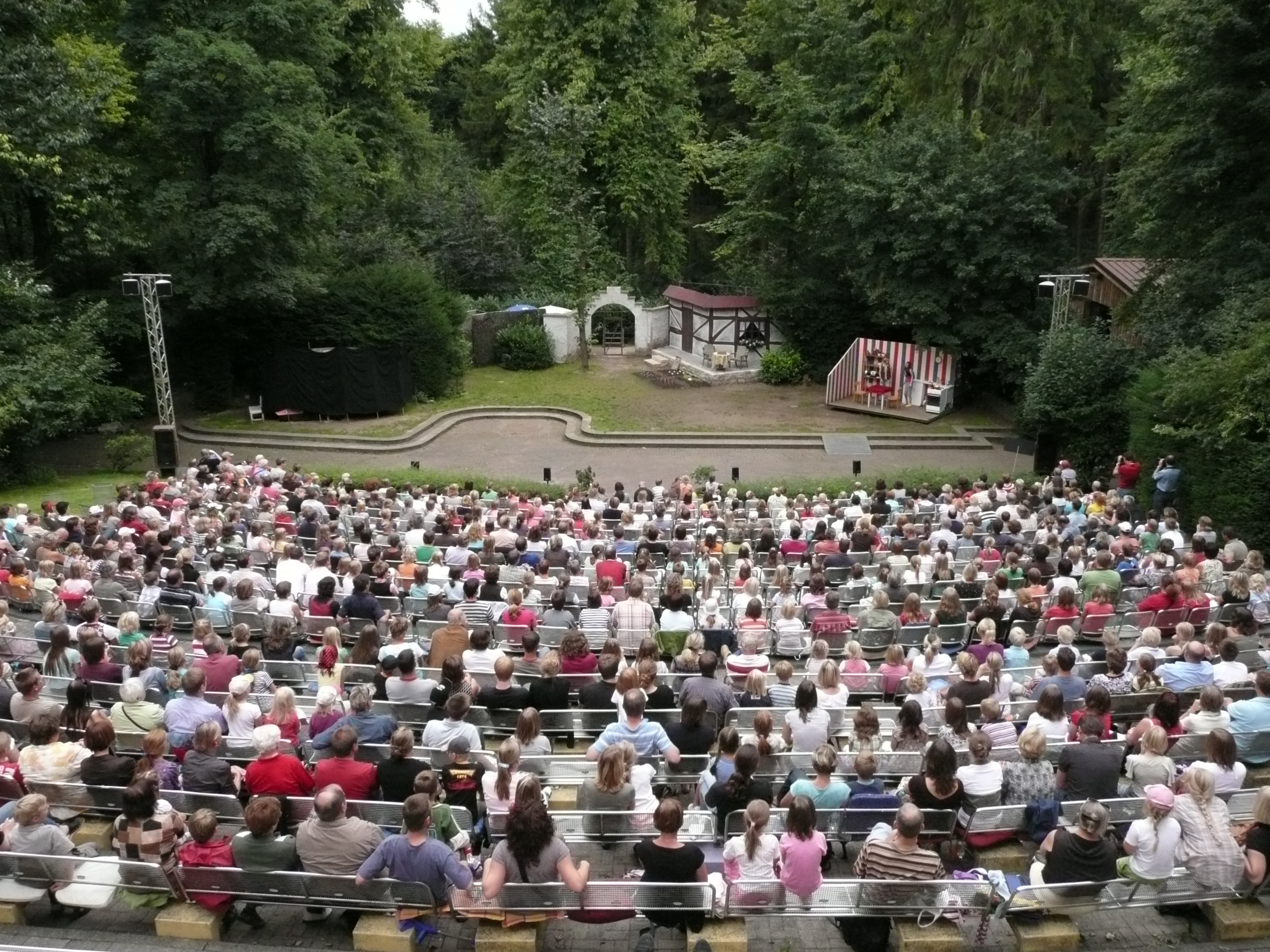 "Die Wilden Hühner" im Sommer 2008 auf der Freilichtbühne Billerbeck